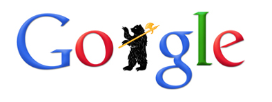 Оформление логотипа Google 10.09.2010. Состоит из логотипа Google и герба Ярославля